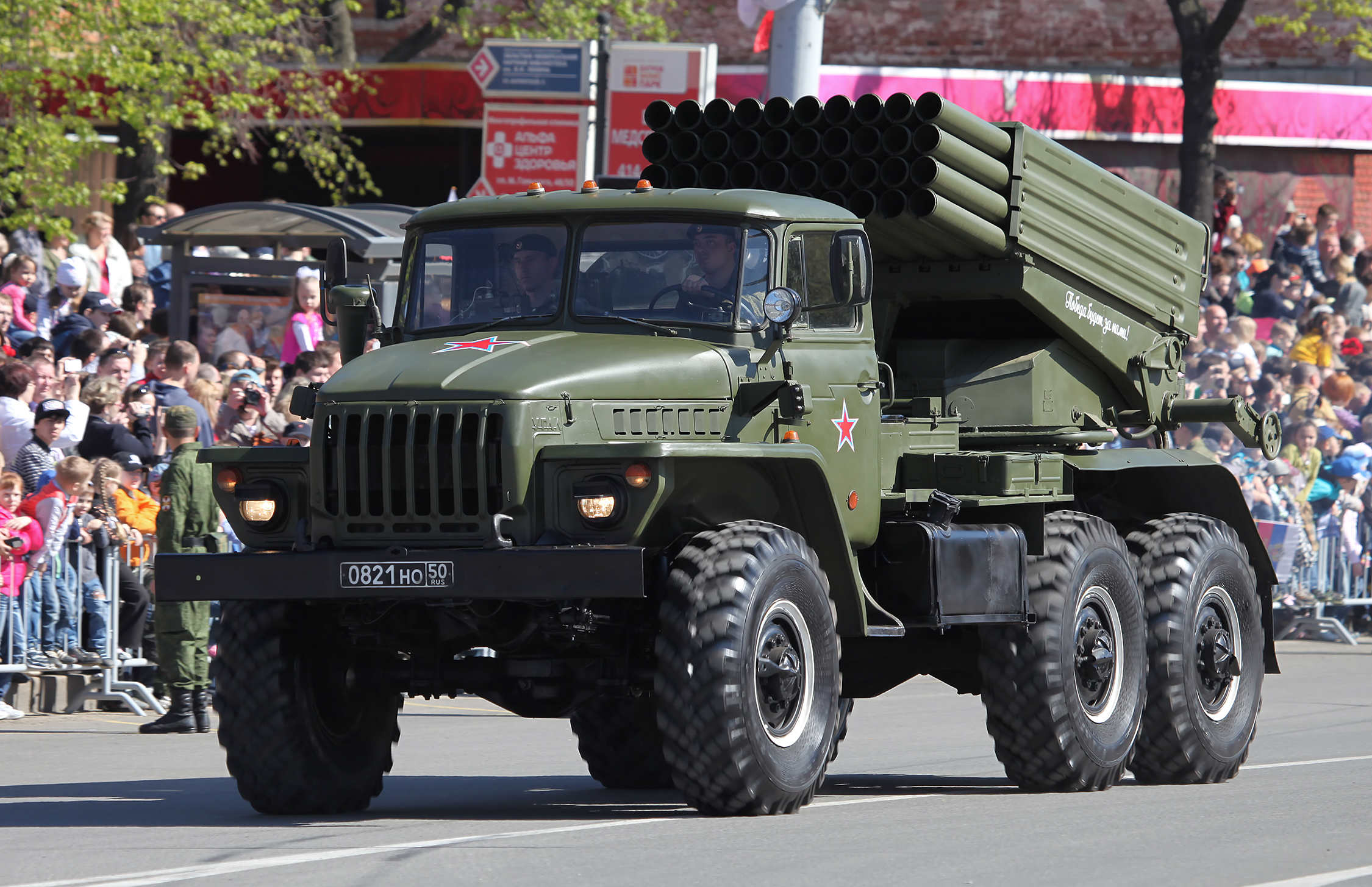 БМ-21 Град (BM-21 Grad MLRS)